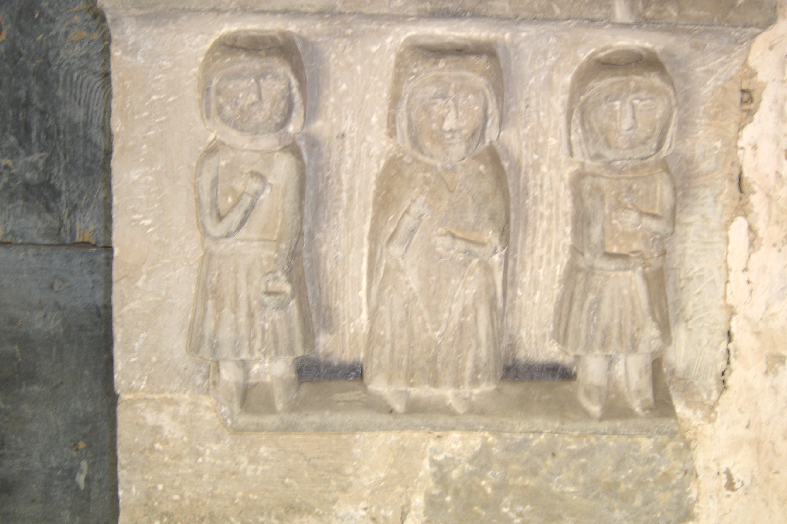 L'ermita de Sant Lleïr de Casabella, al municipi de La Coma i la Pedra, a la Vall de Lord (Solsonès). El grup escultòric de la dreta de la poertalada